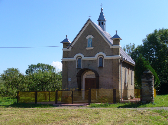 Kaplica w Zegartowicach